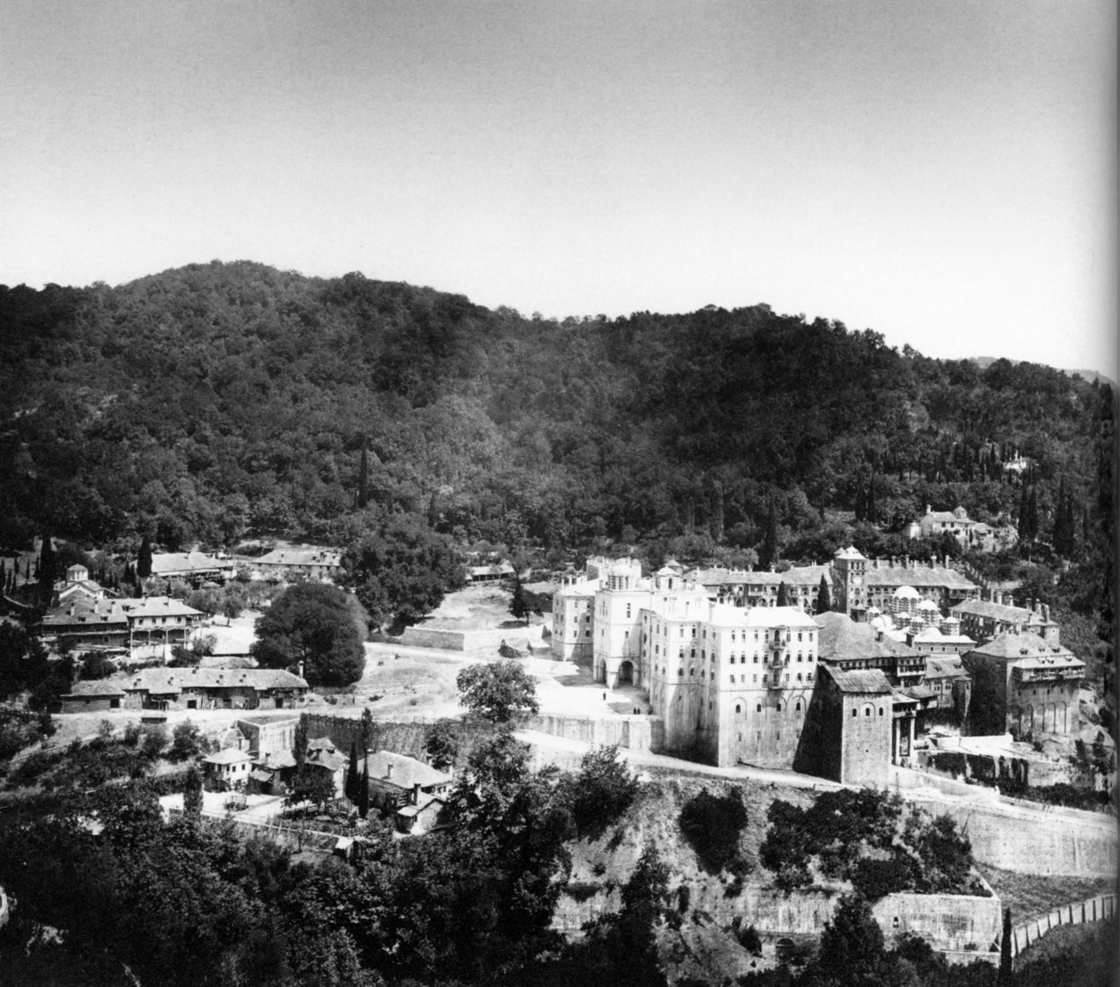 Зографският манастир, фотографиран през 70-те година на XIX в.